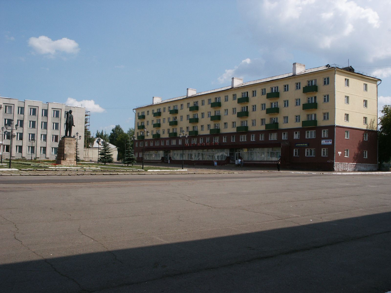 Город Кумертау. Площадь Ленина.